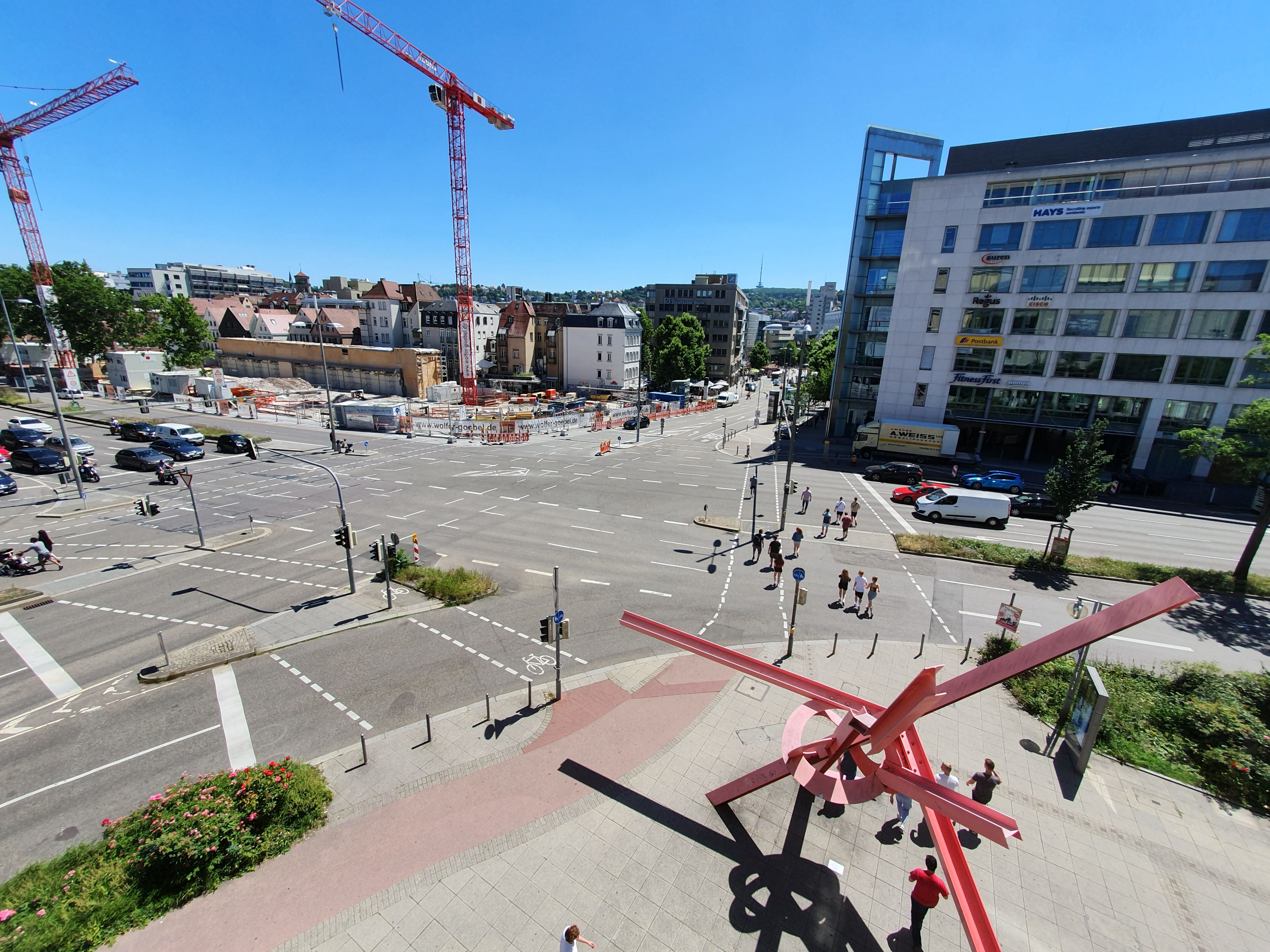 Rotebühlplatz von oben